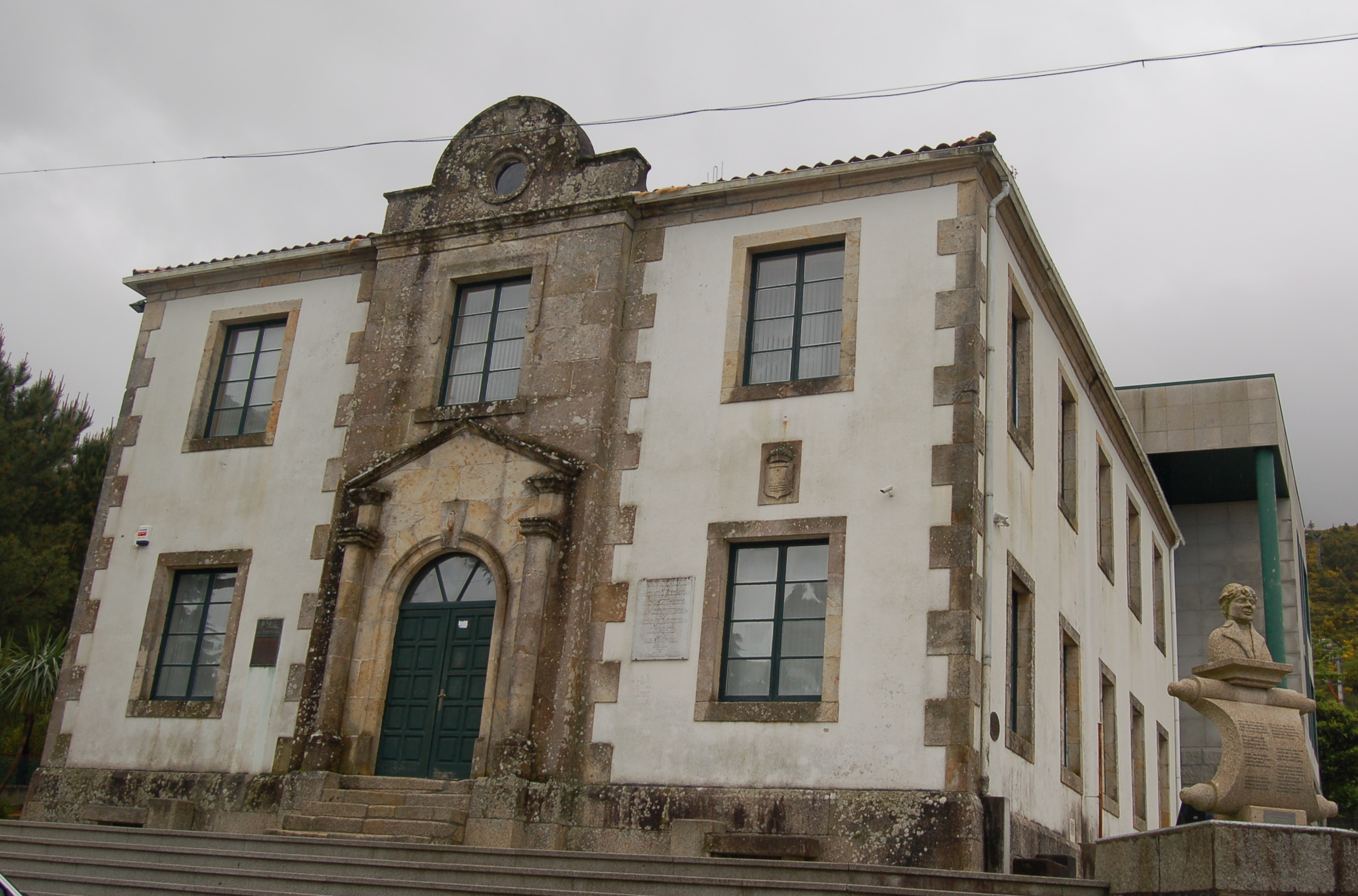 casa consistorial de Carnota Carnota Categoría:Imaxes de Carnota